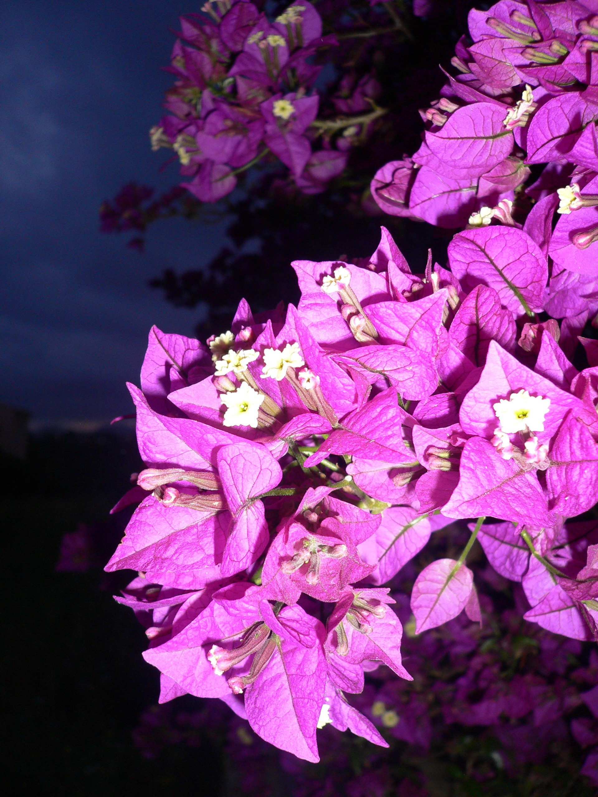 Fioritura Bouganville alle Isole Baleari